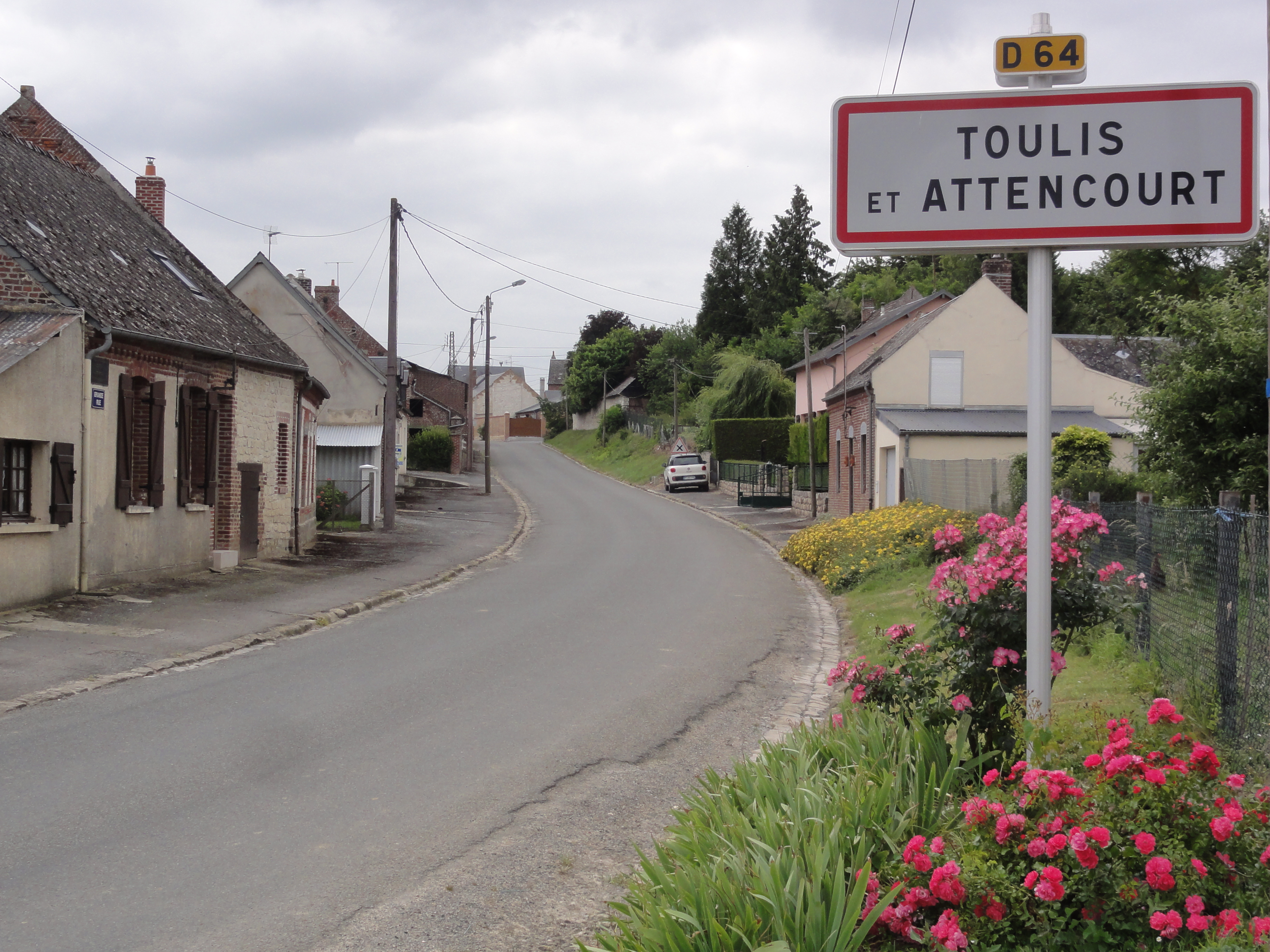 Toulis-et-Attencourt (Aisne) city limit sign